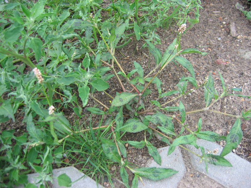 Ampfer-Knöterich Persicaria maculosa